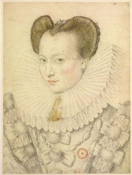 Portrait of Antoinette de Pons, comtesse de La Roche-Guyon et marquise de Guercheville